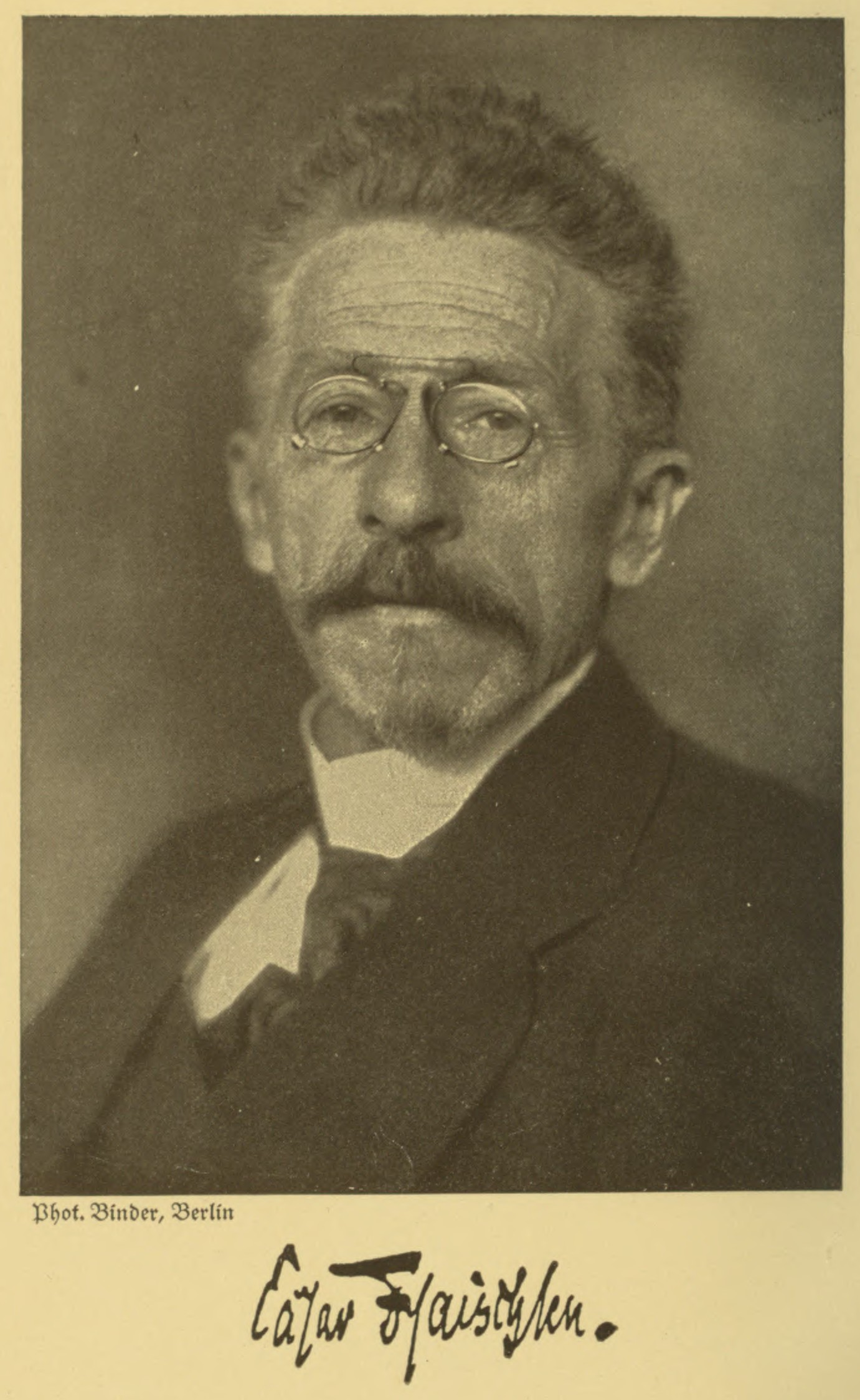 Cäsar Flaischlen. In: Gesammelte Dichtungen, Band 1. Stuttgart, Deutsche Verlags-Anstalt, 1921